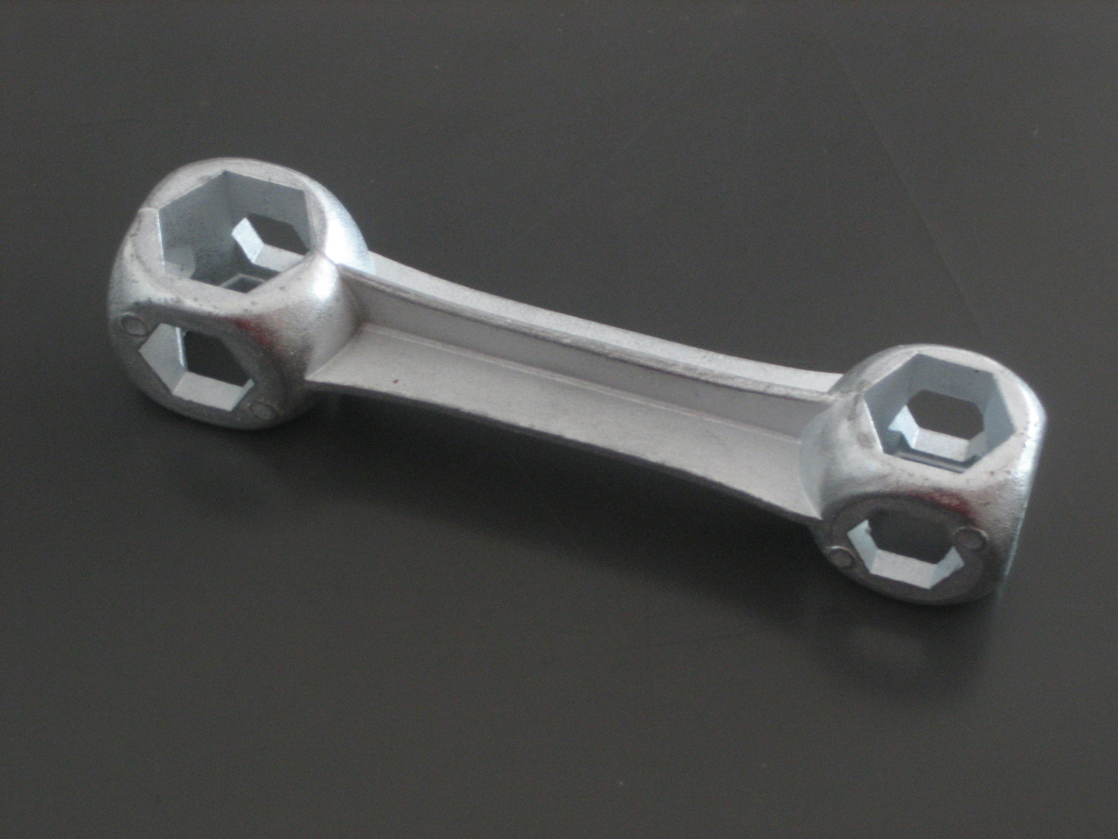 Tiengaatssleutel (dog bone spanner)